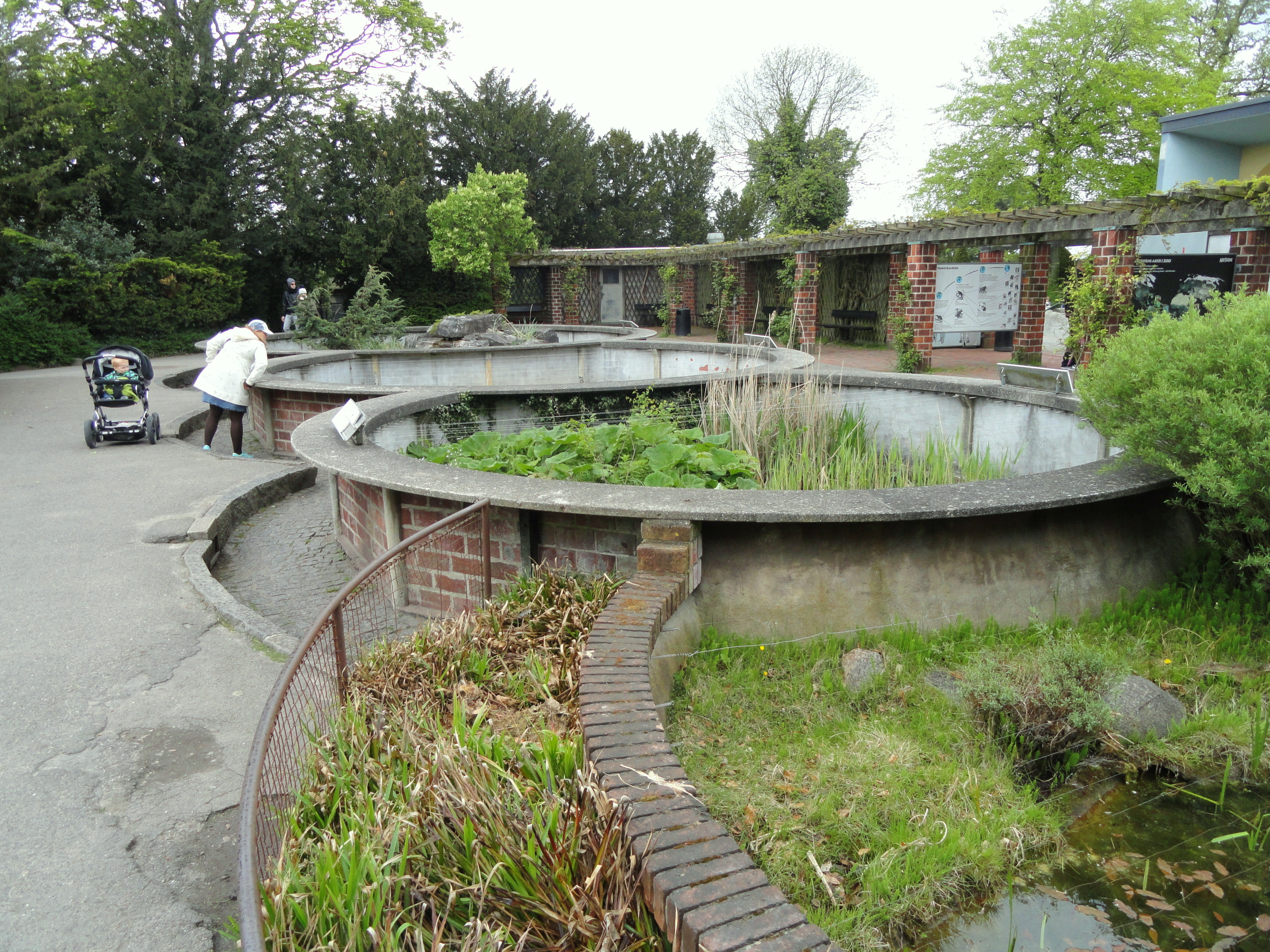 Copenhagen Zoo, Frederiksberg, Copenhagen, Denmark.